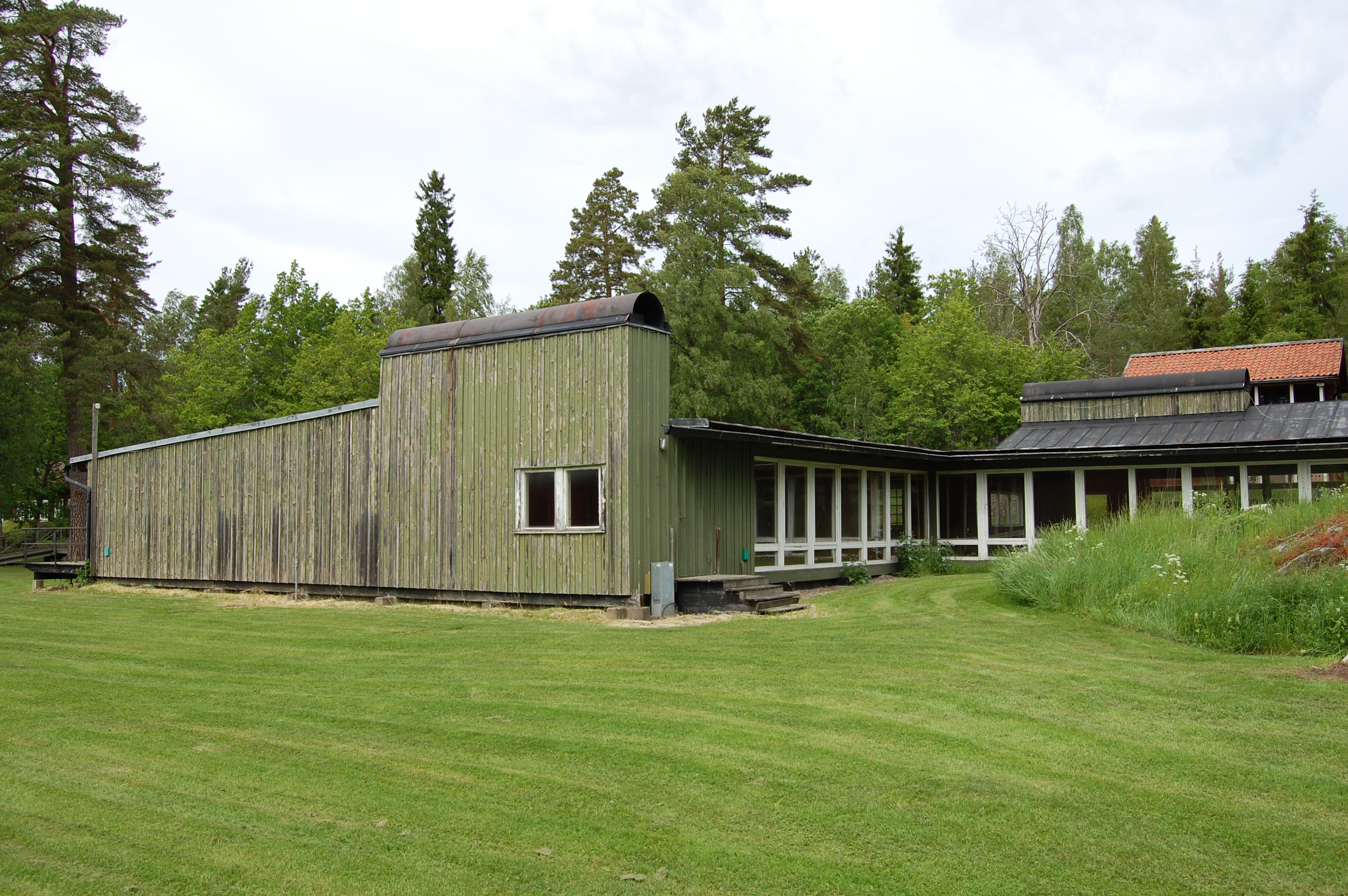 Arbetsterapin på Sätra brunn (kurort)